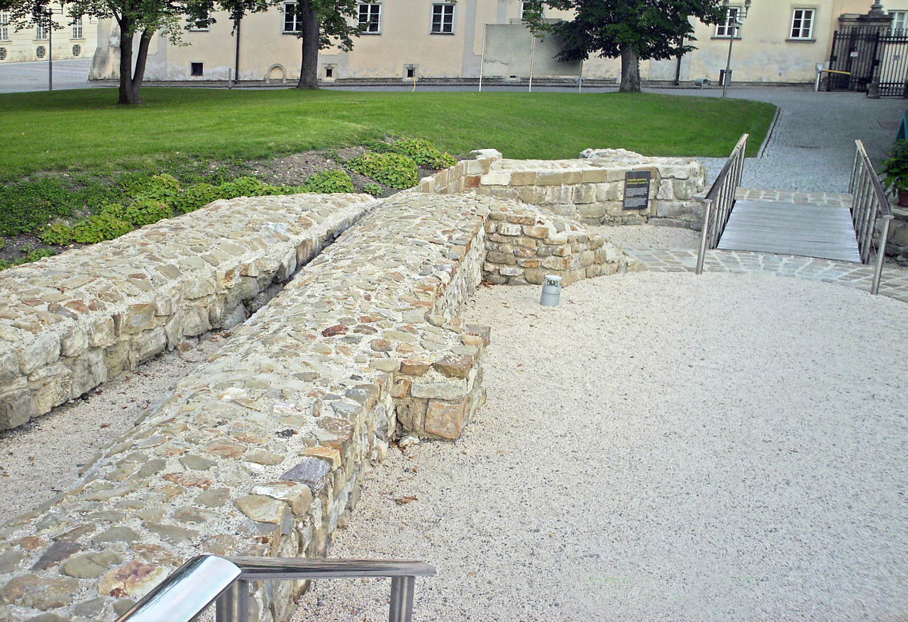 Stift Klosterneuburg, Freigelegte Grundmauern der Pfalzkapelle Herzog Leopolds VI, 1222 über einer Kapelle Leopolds III erbaut. Erster gotischer Bau in Österreich.